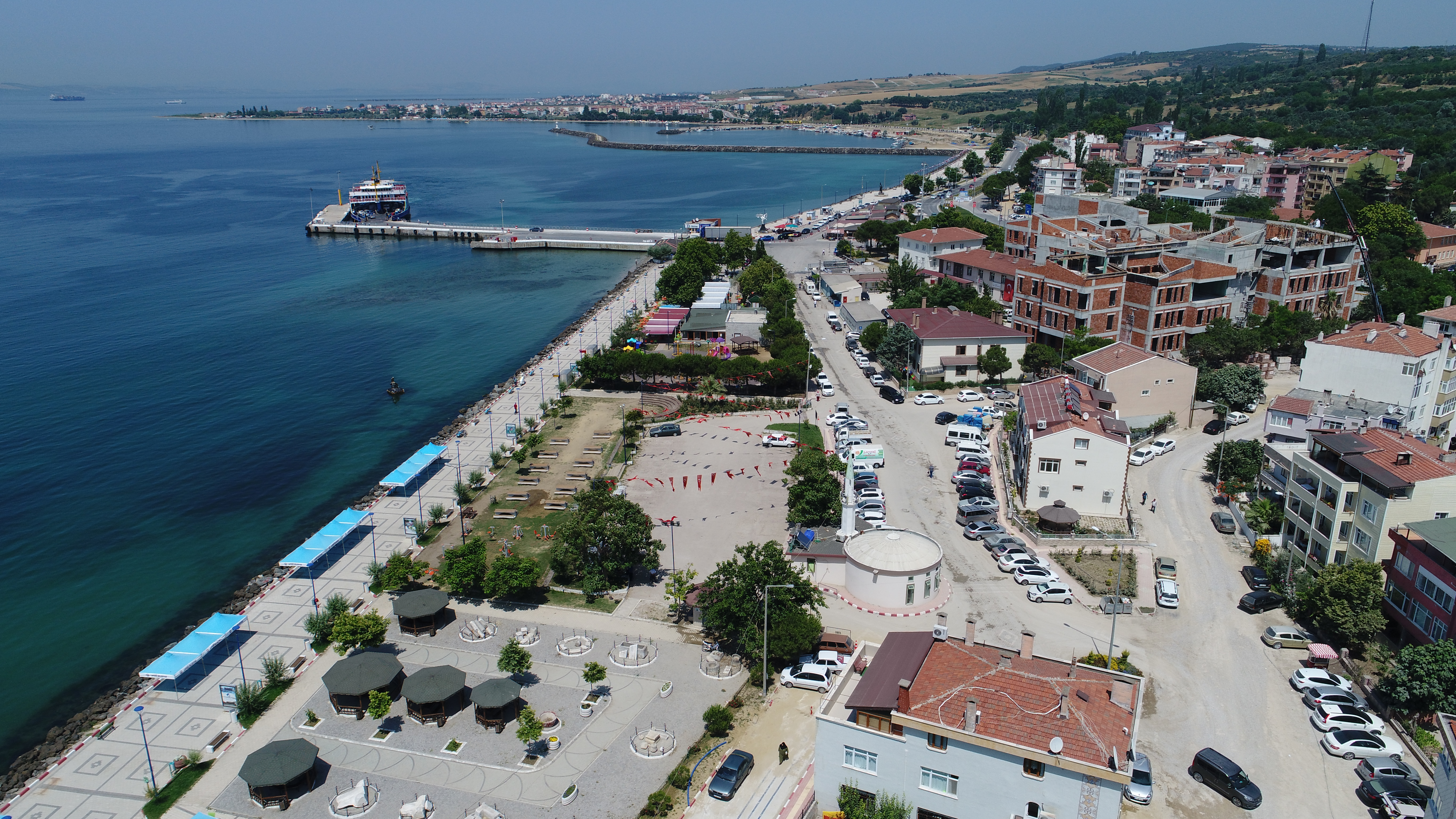 Lapseki İskelesi